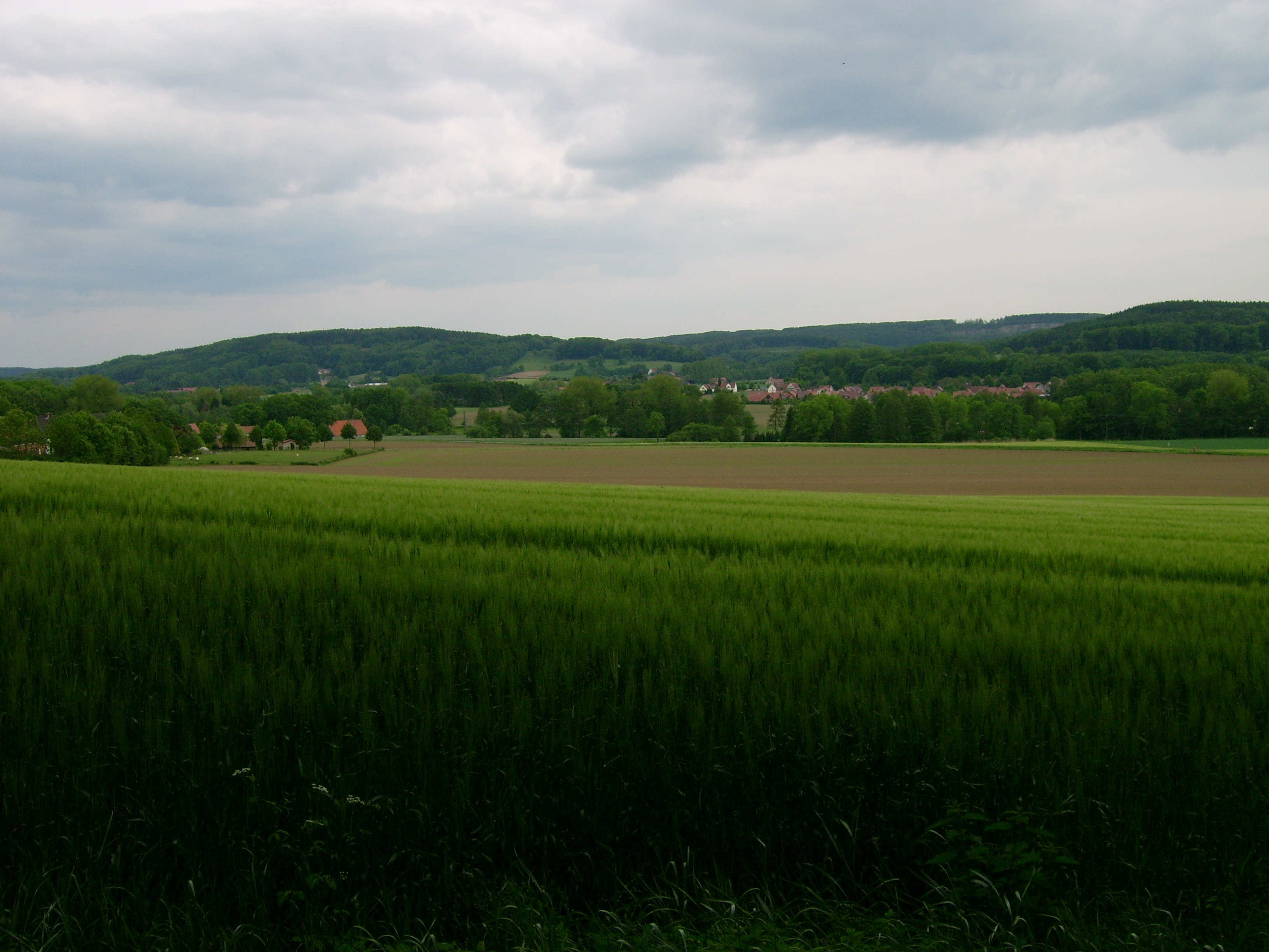 Borgberg, Westerbecker Berg, Butterberg und Mittelberg